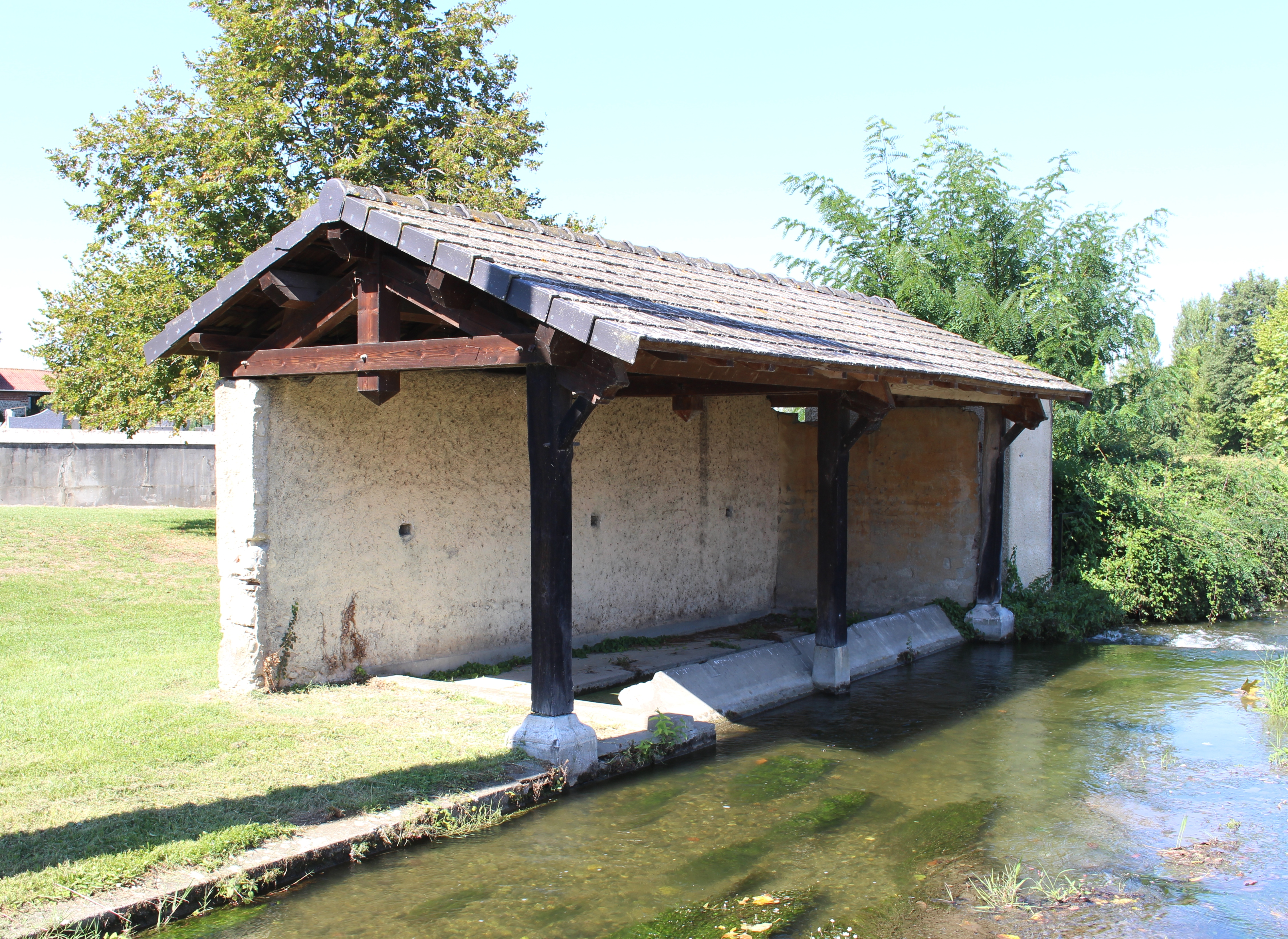 Lavoir de Bazillac (Hautes-Pyrénées)